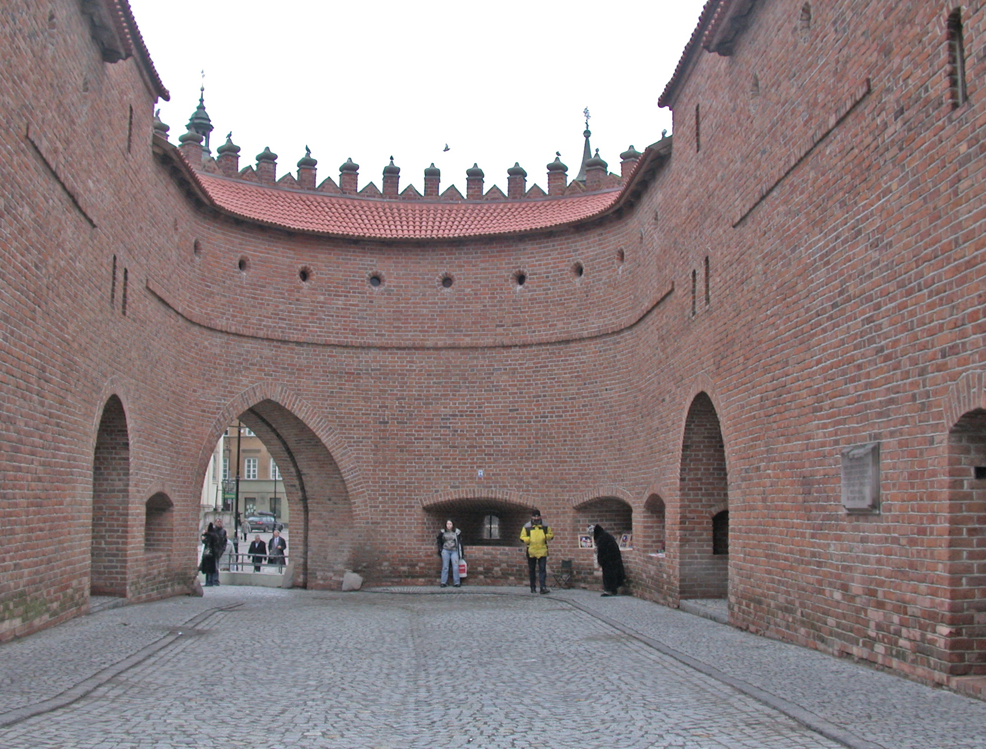 Varsavia, Barbacane (Barbakan), ingresso alla Città Vecchia (Stare Miasto), cortile interno.